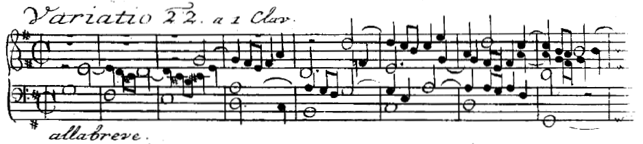 Beginn der 22. Variation aus den "Goldberg-Variationen"